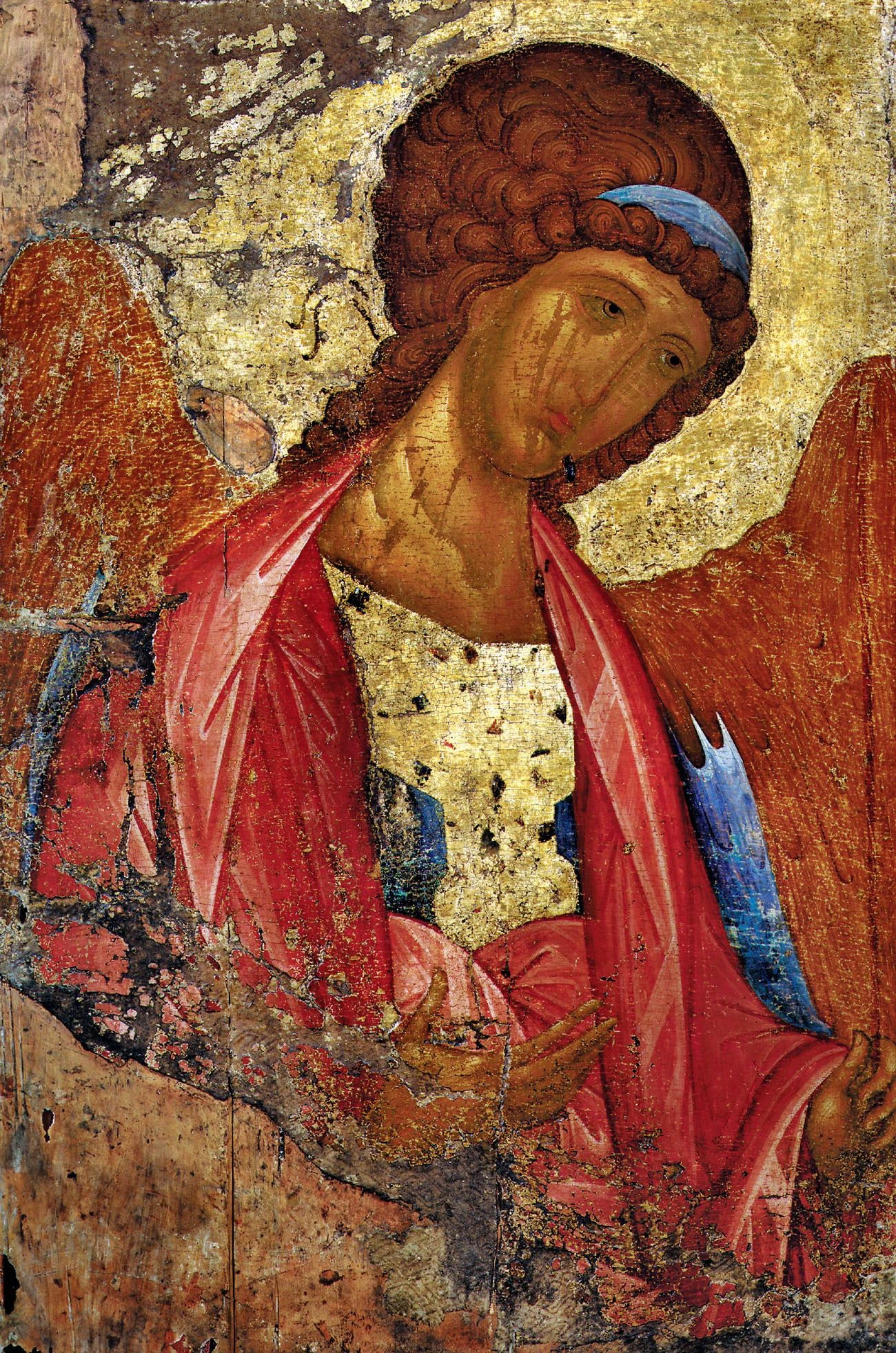 Икона Андрея Рублёва - Архангел Михаил